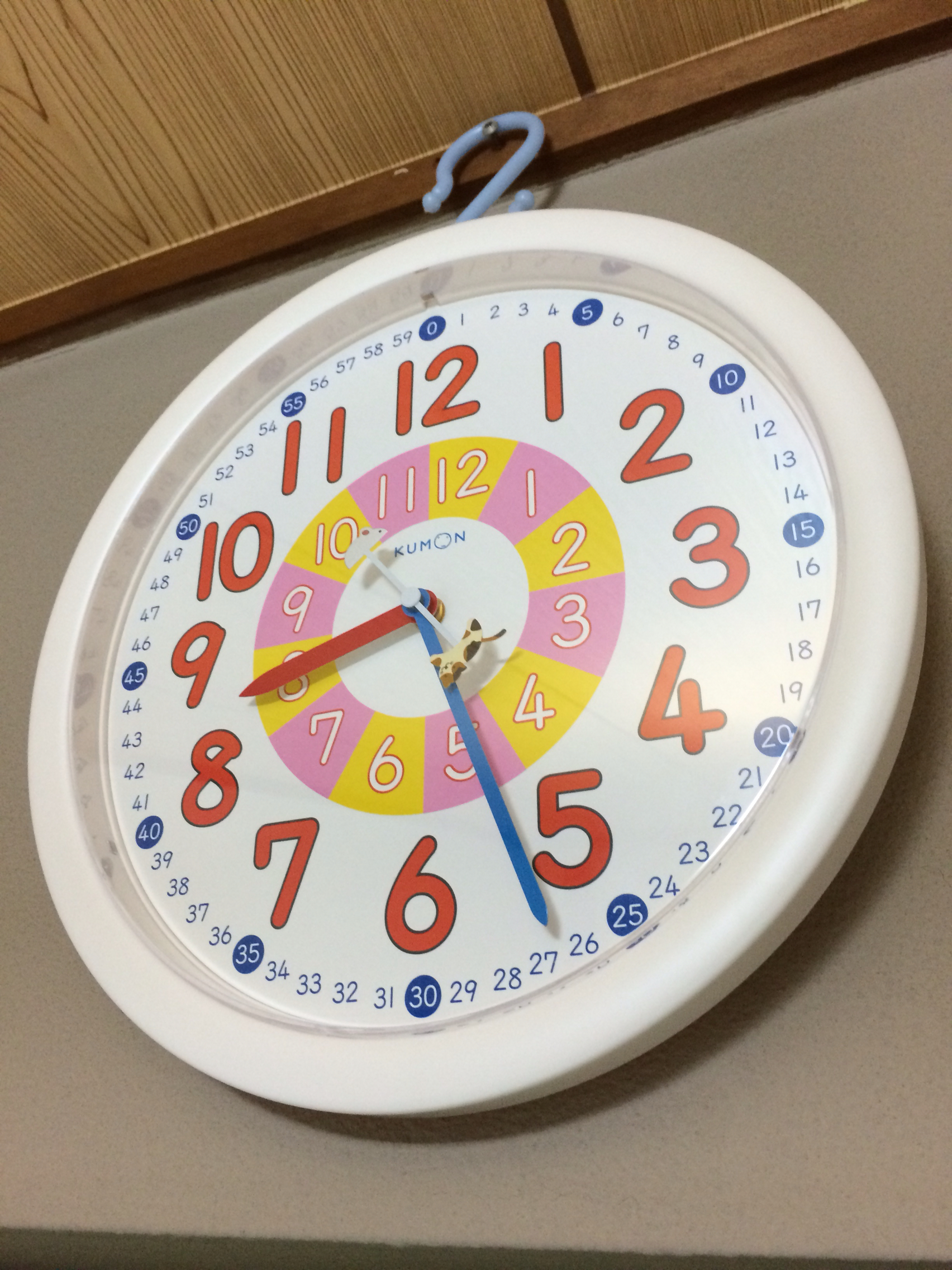 スタディクロック！